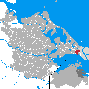 Garz, Landkreis Ostvorpommern, Mecklenburg-Vorpommern